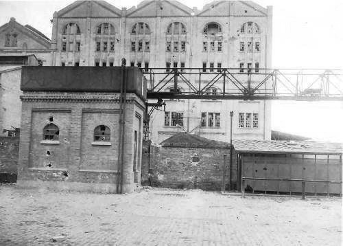 Vista parcial da fábrica Antarctica Paulista em 1924, com os estragos causados pelo bombardeamento durante a Revolução